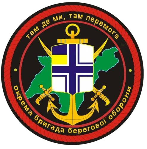 Нарукавний шеврон 36-ї окремої бригади берегової оборони ВМС ЗСУ